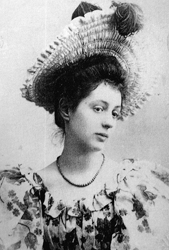 Олександра Скоропадська, дружина Павла Скоропадського